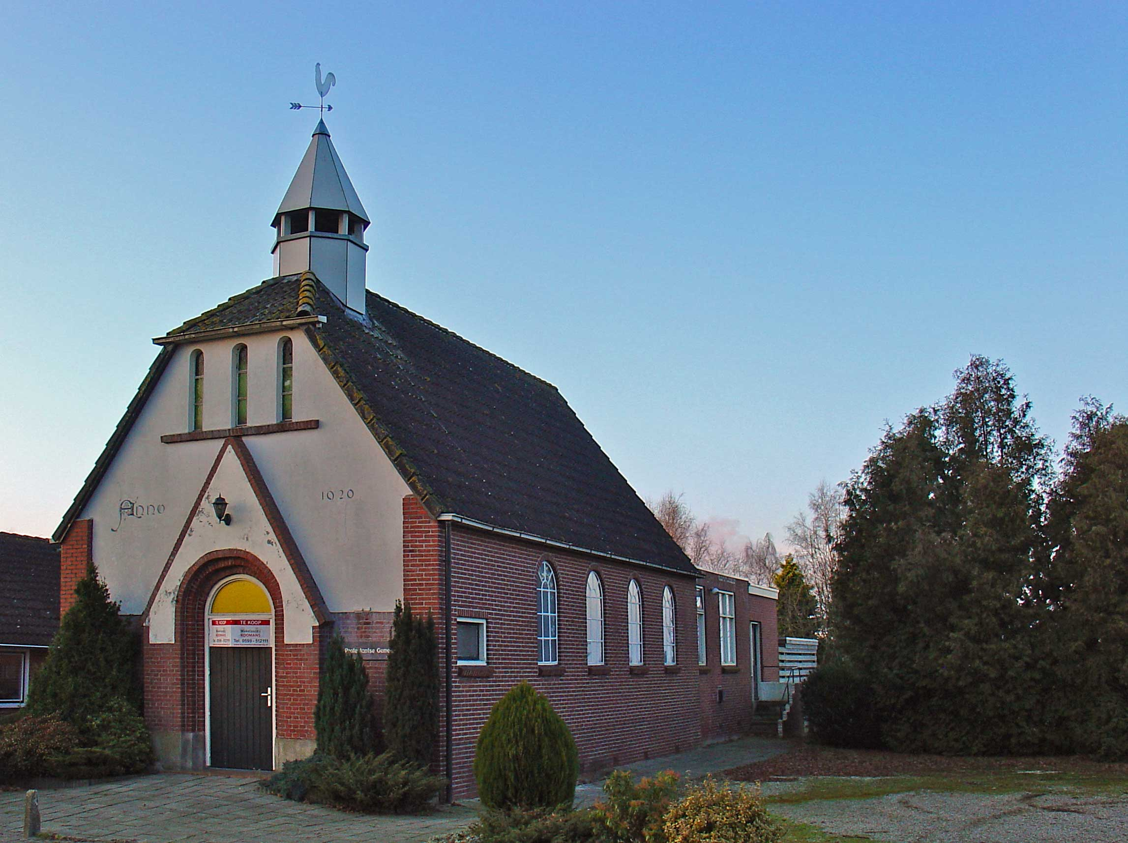 Voormalig kerkgebouw van Drouwenermond